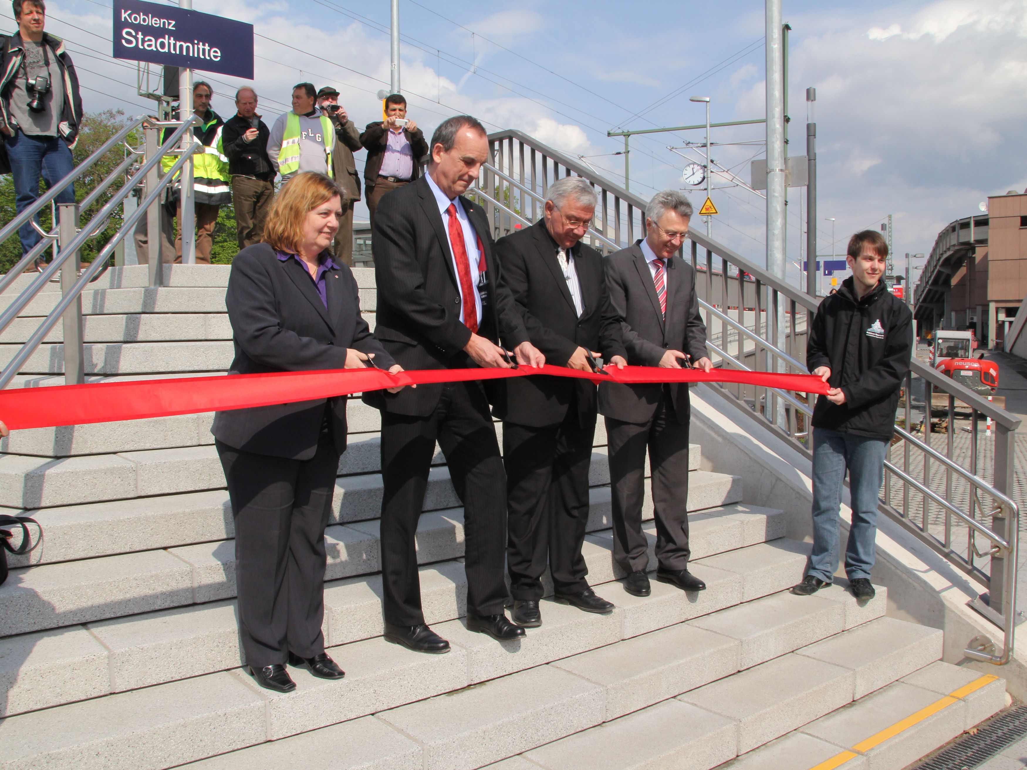 Koblenz im Buga-Jahr 2011 - Eröffnung des Haltepunkts Koblenz Stadtmitte - Auf der Treppe stehen von links nach rechts Susanne Kosinsky, Regionalbereichsleiterin DB, Udo Wagner, Konzernrepräsentant der DB für Rheinland-Pfalz und Saarland, Oberbürgermeister Joachim Hofmann-Göttig und Lothar Kaufmann, Abteilungsleiter im rheinland-pfälzischen Wirtschaftsministerium